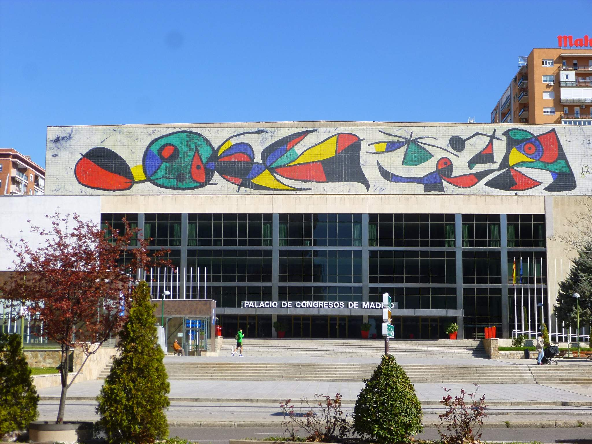 Palacio de Congresos de Madrid